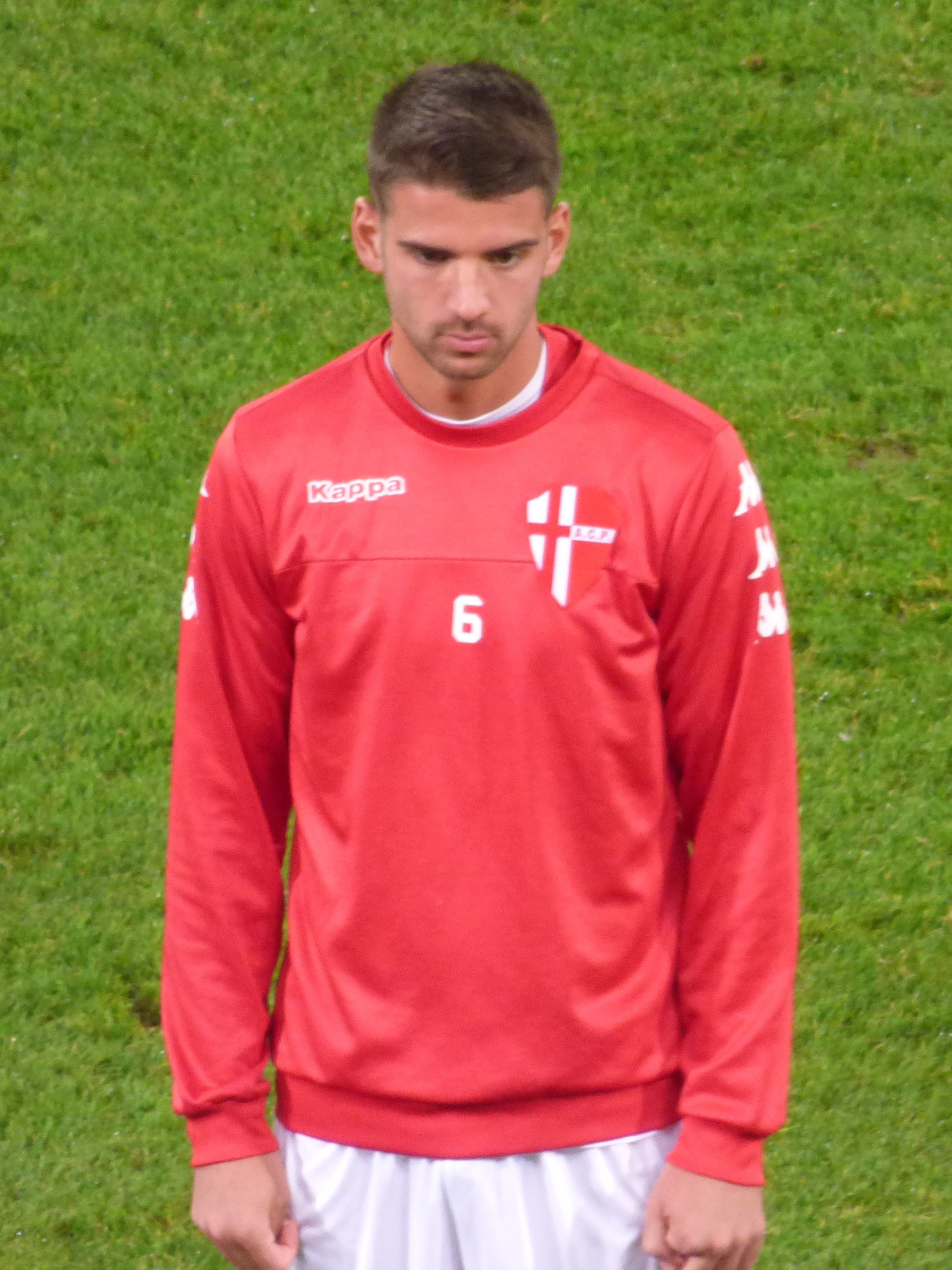 Pietro Ceccaroni lors du match amical RC Lens - Calcio Padova, le 11 octobre 2018 au Stade Bollaert-Delelis de Lens.